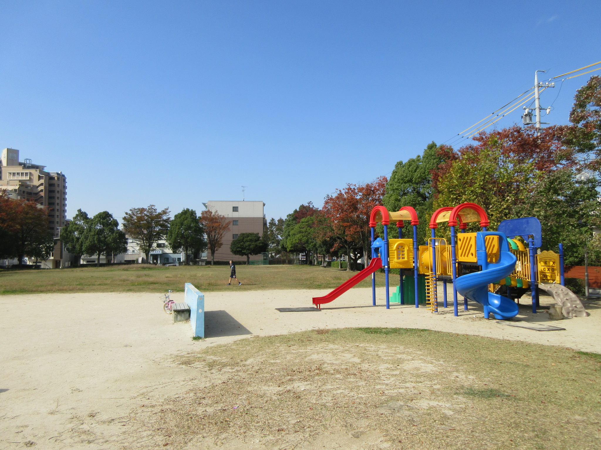 暁公園（愛知県岡崎市）